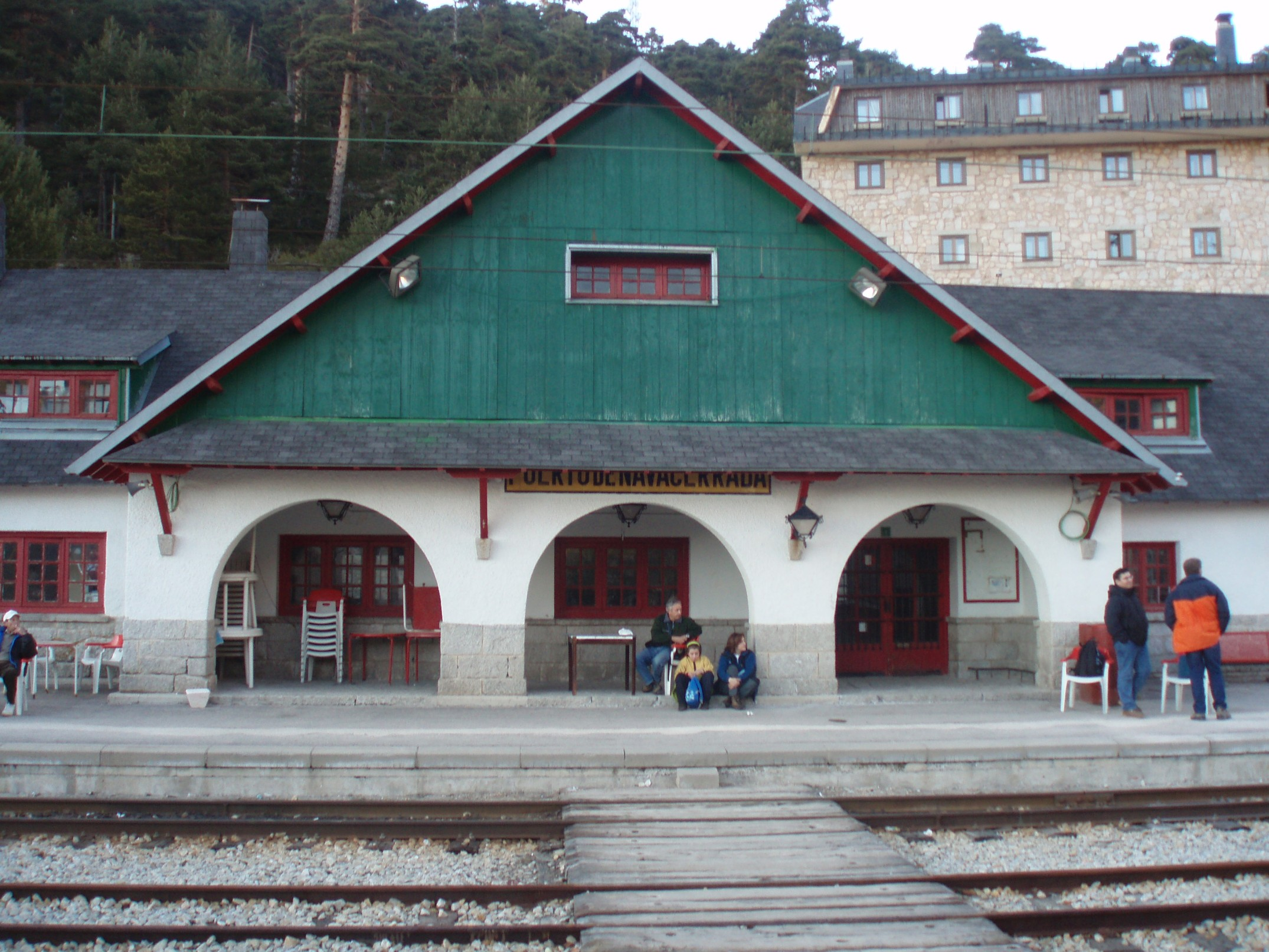 Edificio de la estación de tren del Puerto de Navacerrada (Sierra de Guadarrama, España).